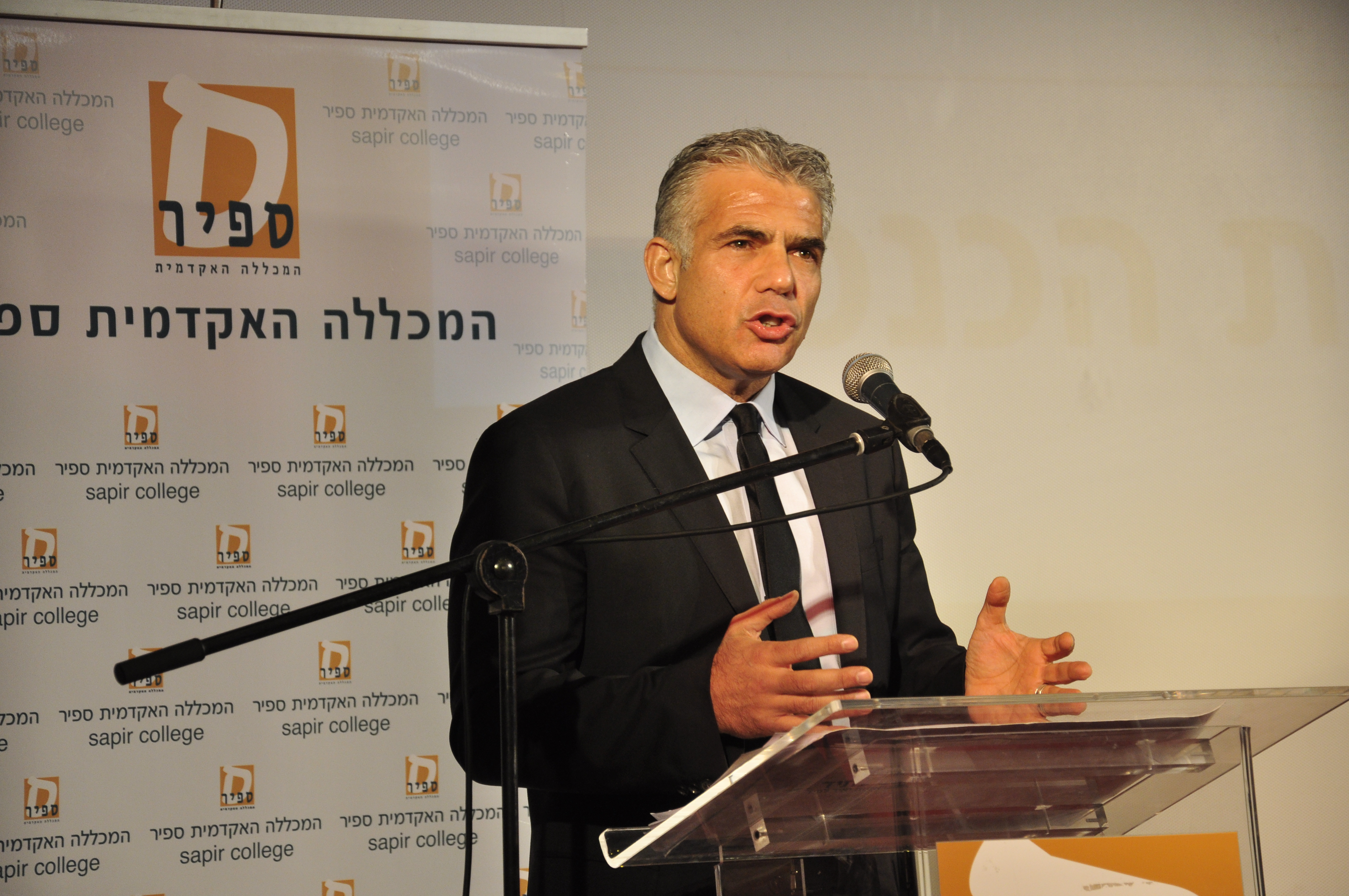 כנס שדרות לחברה במכללה האקדמית ספיר ובעיר שדרות 2015